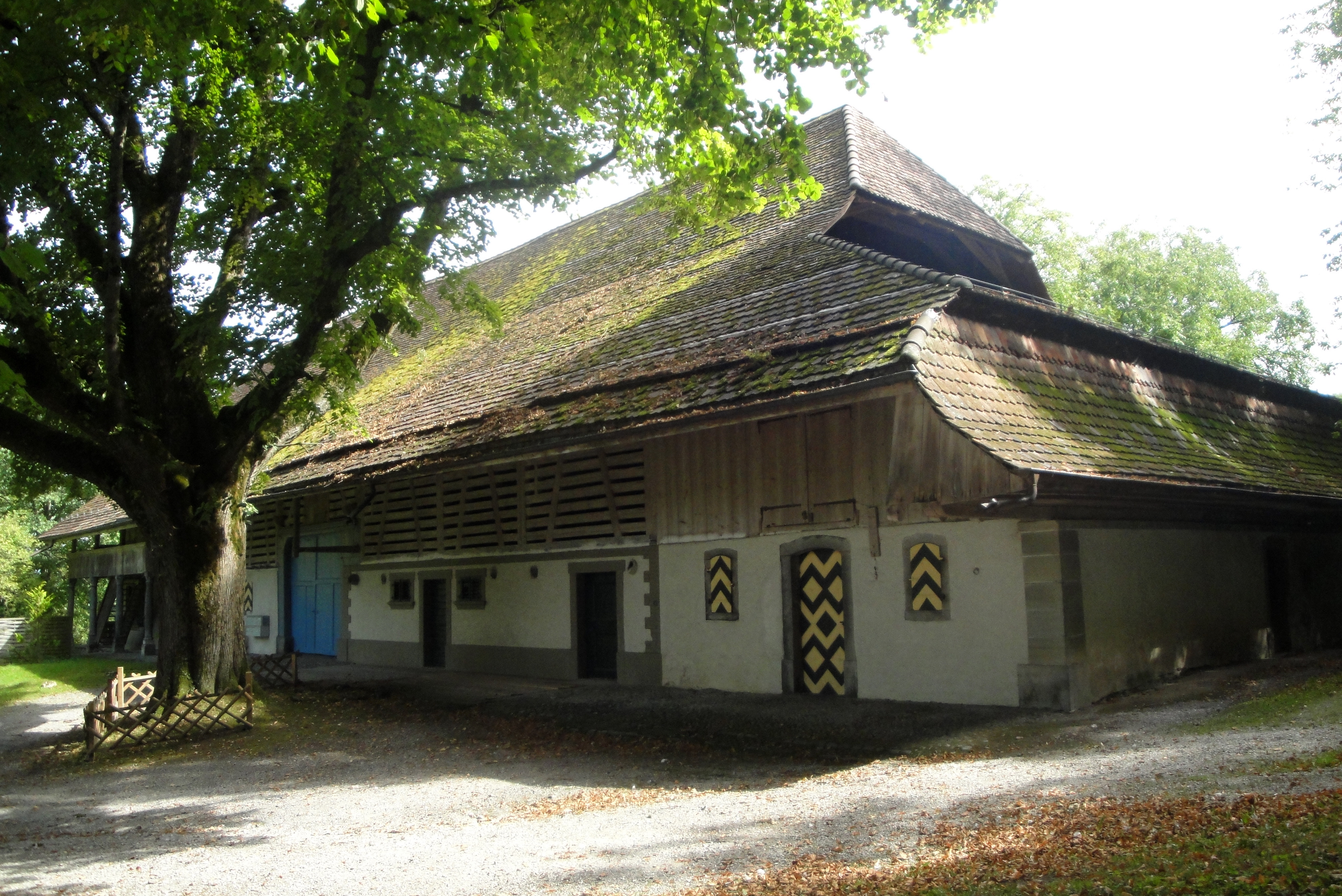 Rümligen, Dependenz von Schloss Rümligen